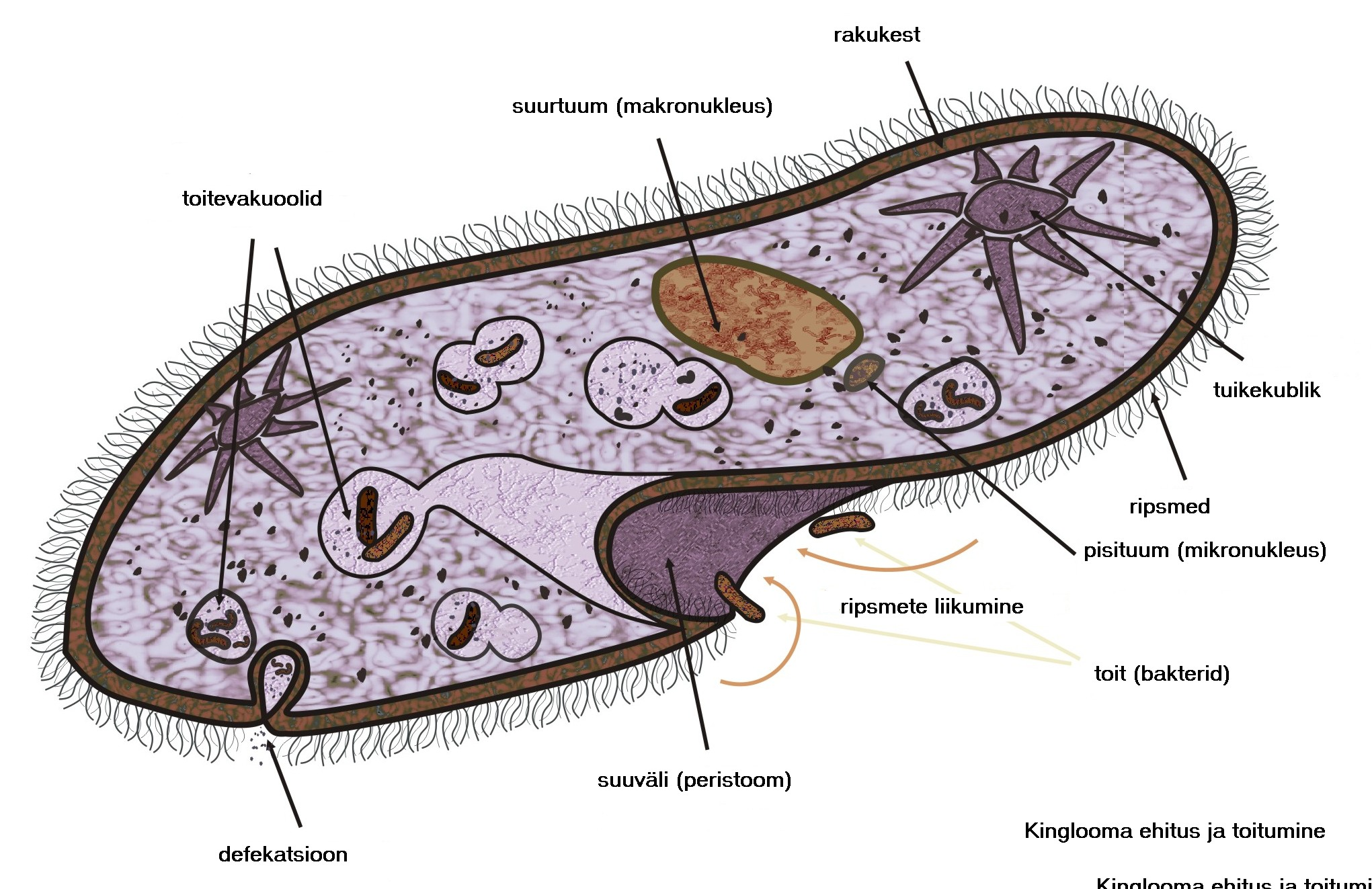 Kinglooma ehitus